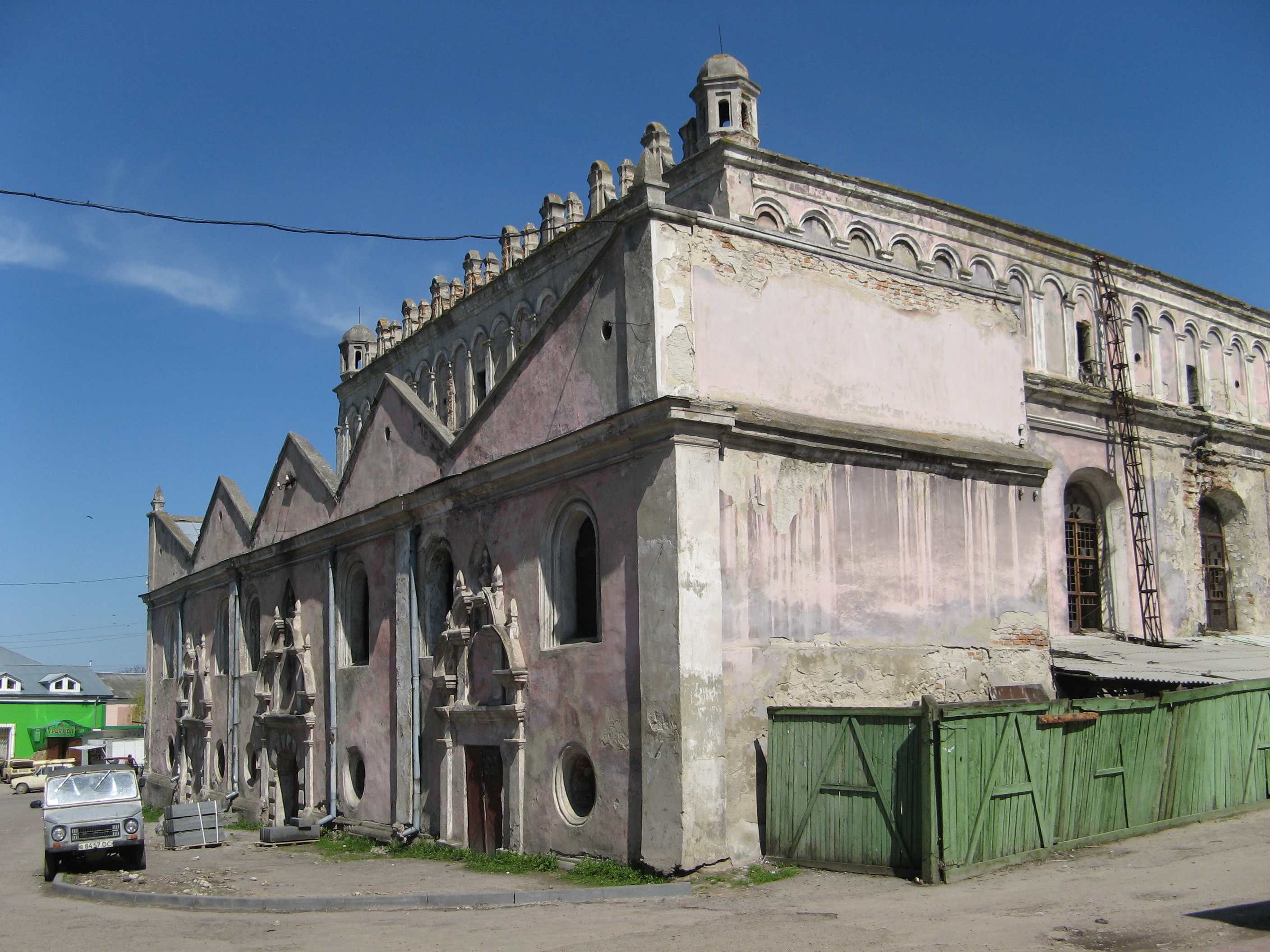 Synagoga w Żółkwi